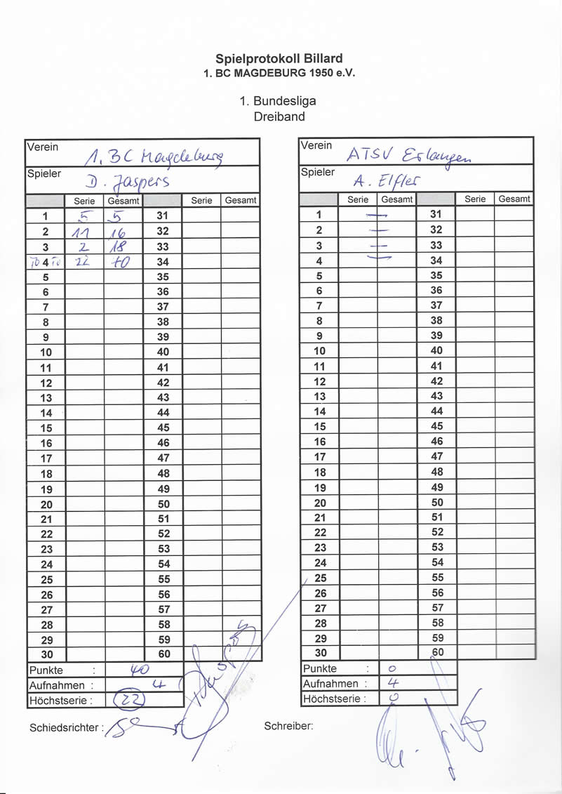 Partiezettel von Dick Jaspers' Weltrekord im Einzeldurchschnitt von 10,000 am 21. Januar 2018. Die Partie spielte er für den 1. BC Magdeburg gegen Andreas Efler.